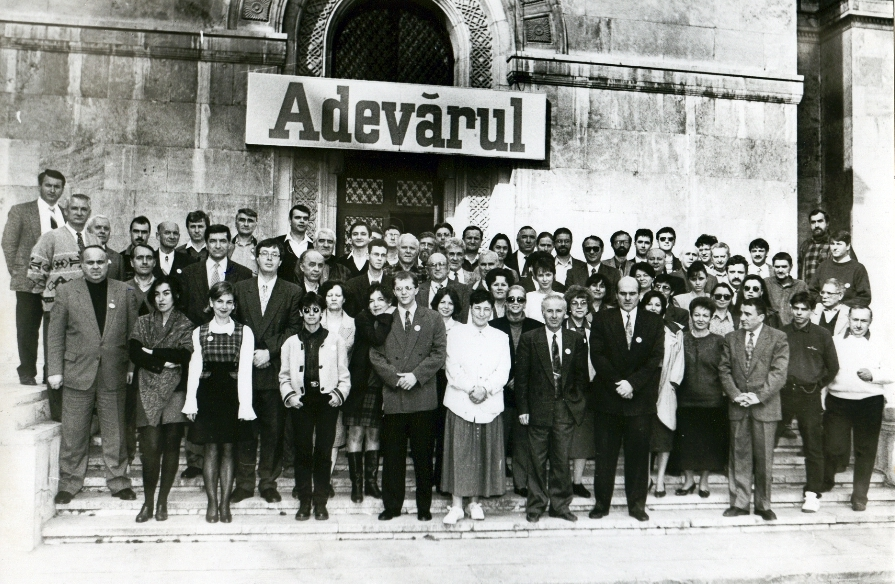 Poză de grup la Adevărul. Dumitru Tinu, Cristian Tudor Popescu, Adrian Ursu etc. în prim-plan.